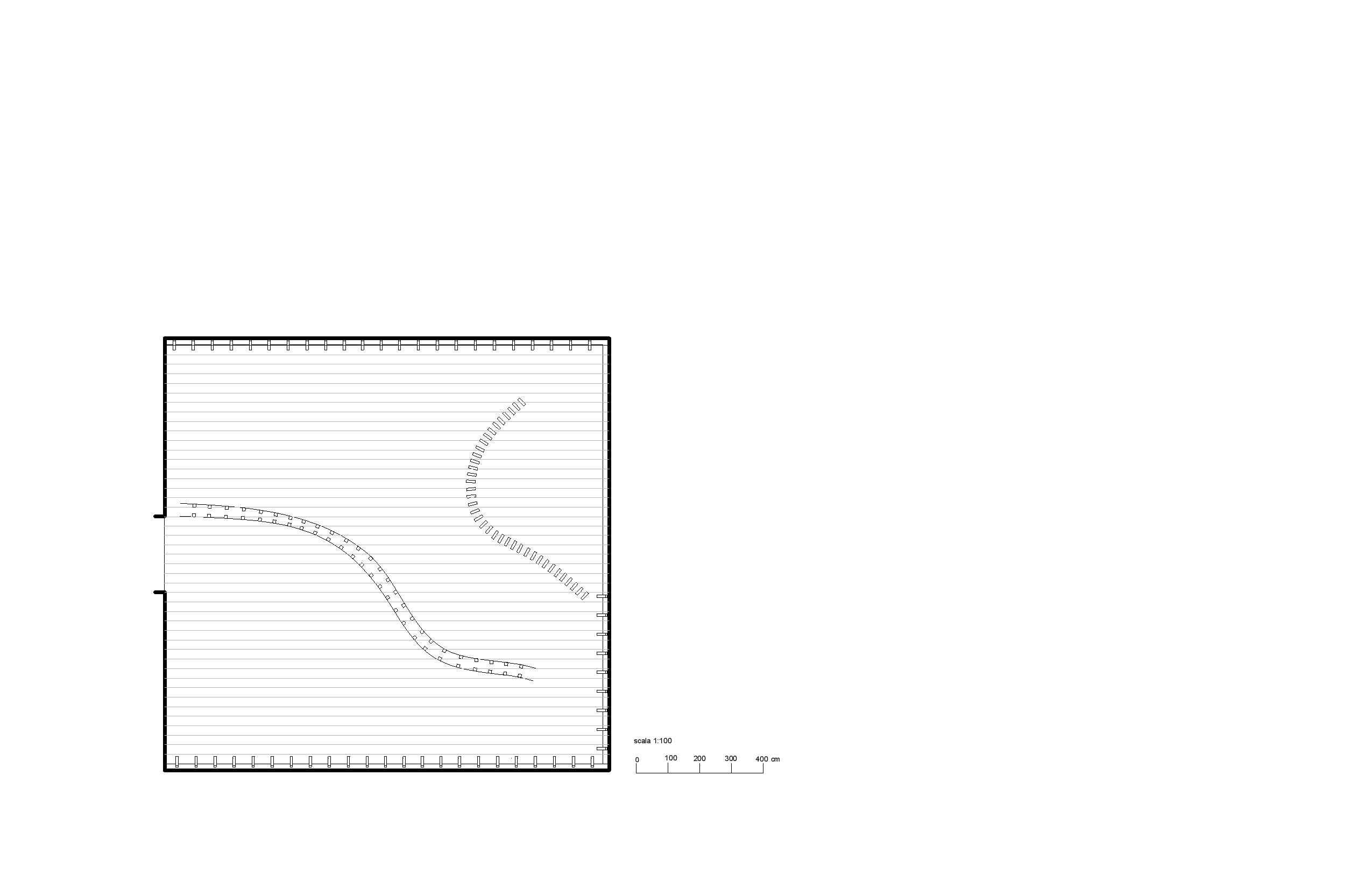 Template:Screenshotcopyrighted